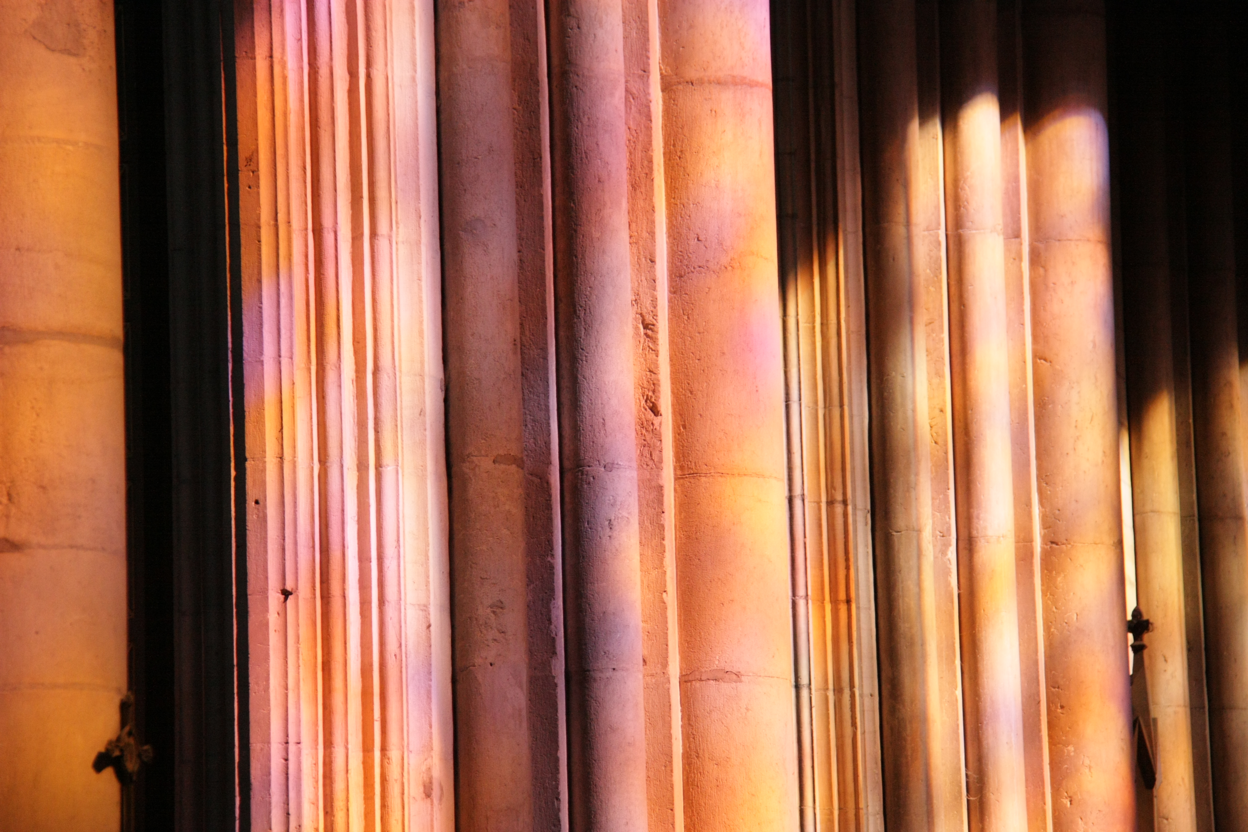 Jeux de couleurs sur les piliers provenant de la lumière passant à travers les vitraux